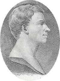 Jakob Jonas Björnståhl (1731-1779)